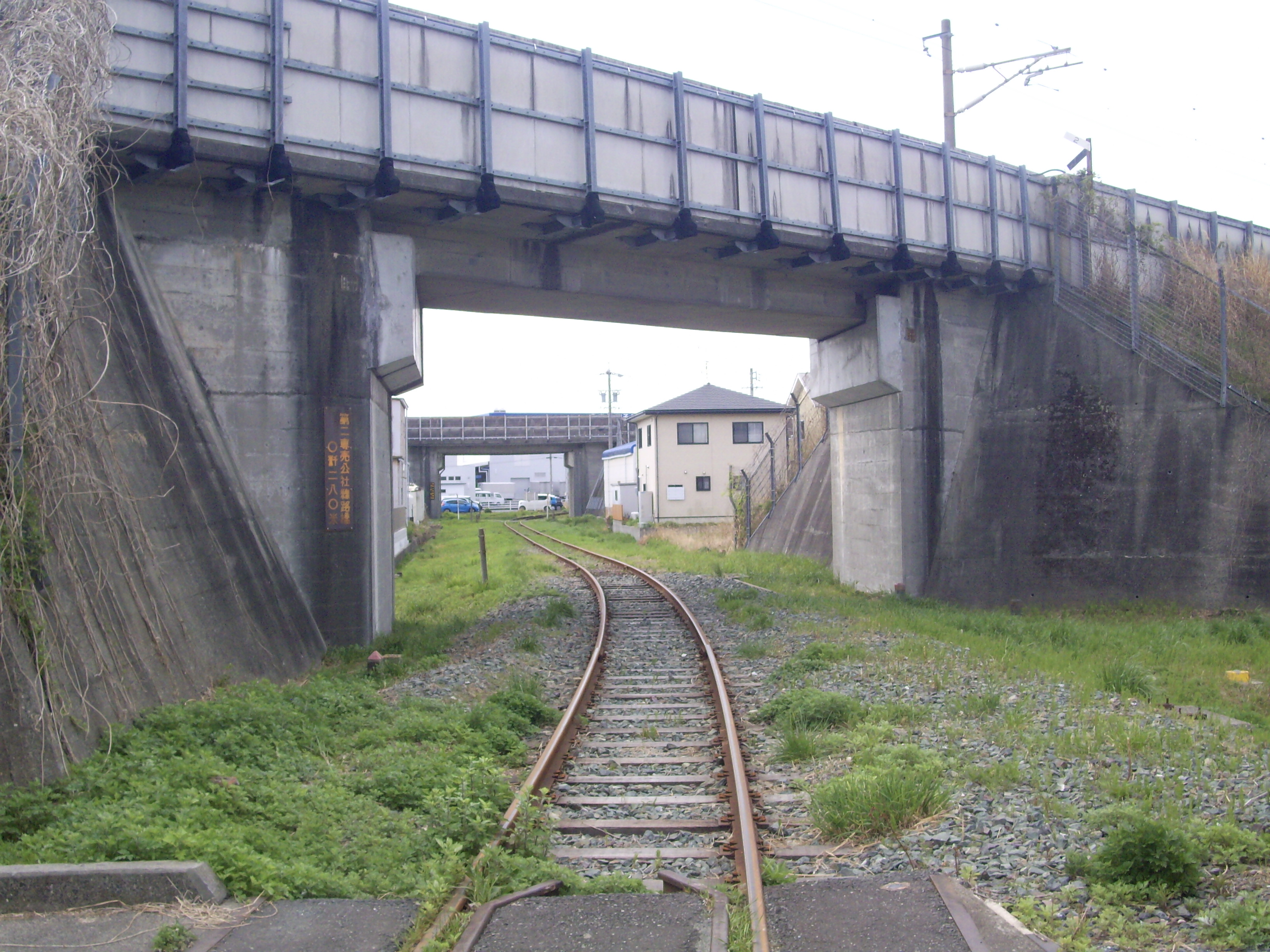 JR東海浜松工場への引き込み線の立体交差、在来線用軌道を跨ぐ線路橋が新幹線用で、画面奥を横切る高架橋が新幹線本線 ㊟カメラを起動すると日付機能が出荷時のものに初期化されるため、ファイル履歴の投稿日時とメタデータの原画像データの生成日時が異なります（本概要欄の下記日付が撮影日）